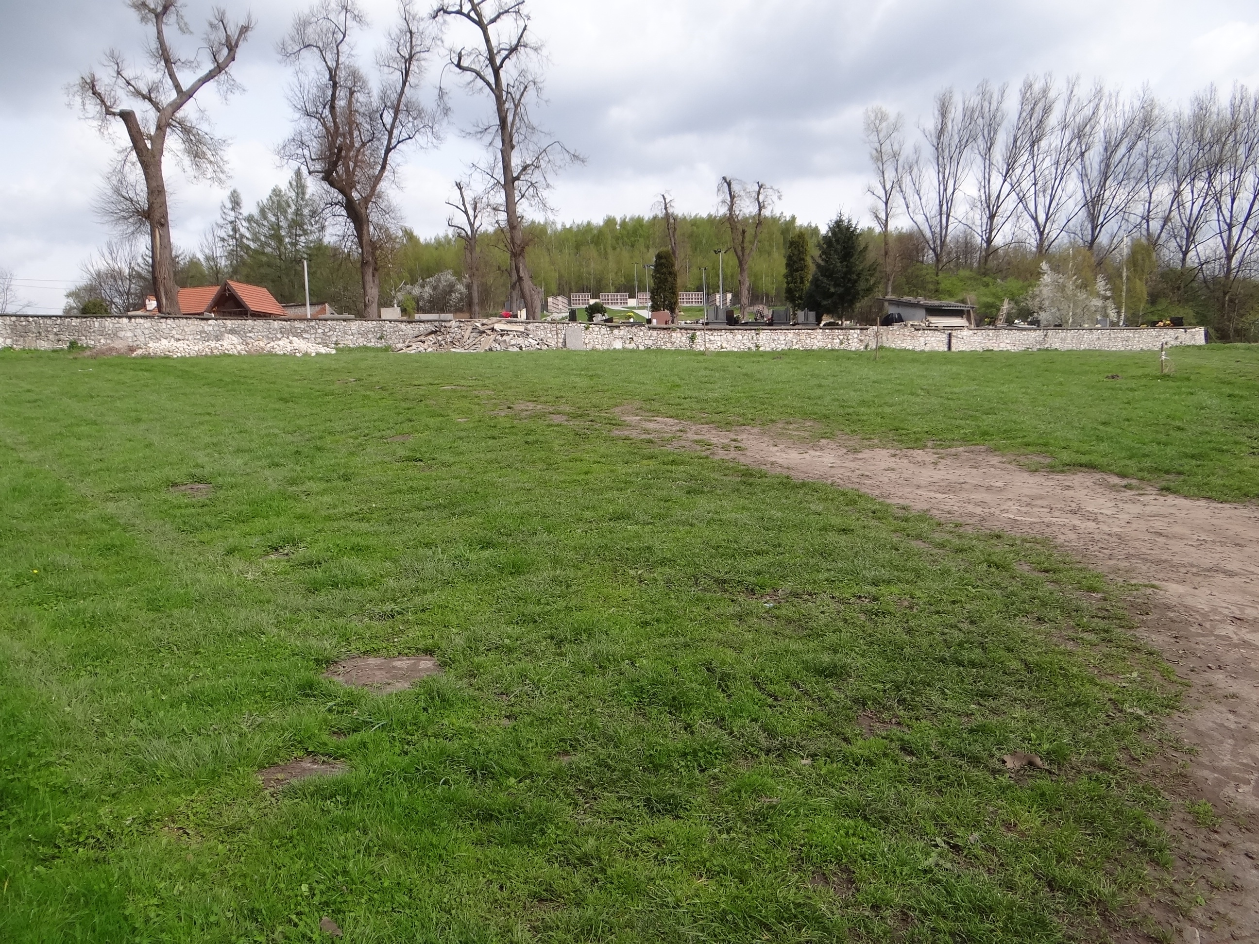 Cmentarz na wzgórzu Winnica